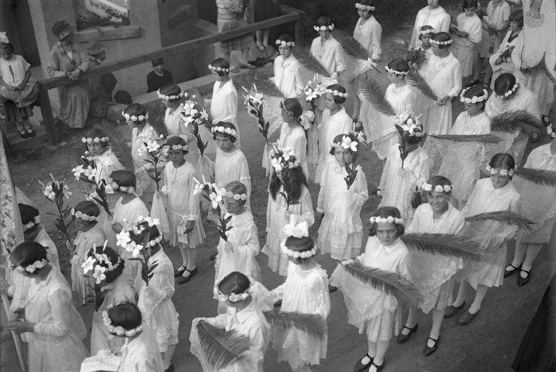 Der Tag der Palmen ! Die alljährliche Palmenprozession, welche an dem Sonntag vor Ostern zum Gedächtnis des Einzuges Jesu in Jerusalem in Bingen a/Rhein stattfindet. Das Bild zeigt Kinder mit geweihten Palmenzweigen im Prozessionszuge am Palmsonntag in Bingen am Rhein.